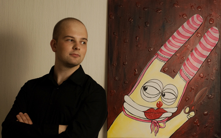 Jaanus Sakkis koos enda maaliga "Rääkimata Lugu"